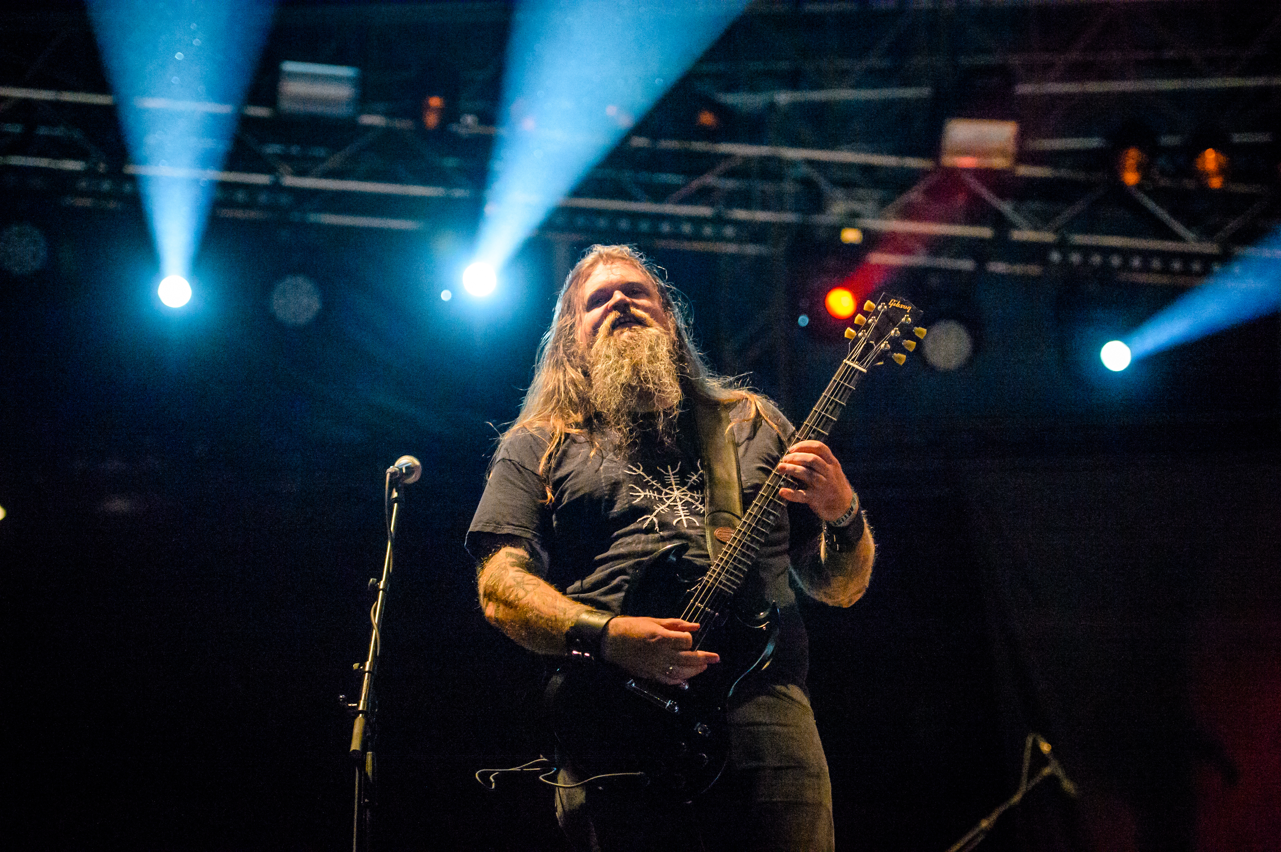 'RockHarz Open Air 2016; Ballenstedt': 'Enslaved'